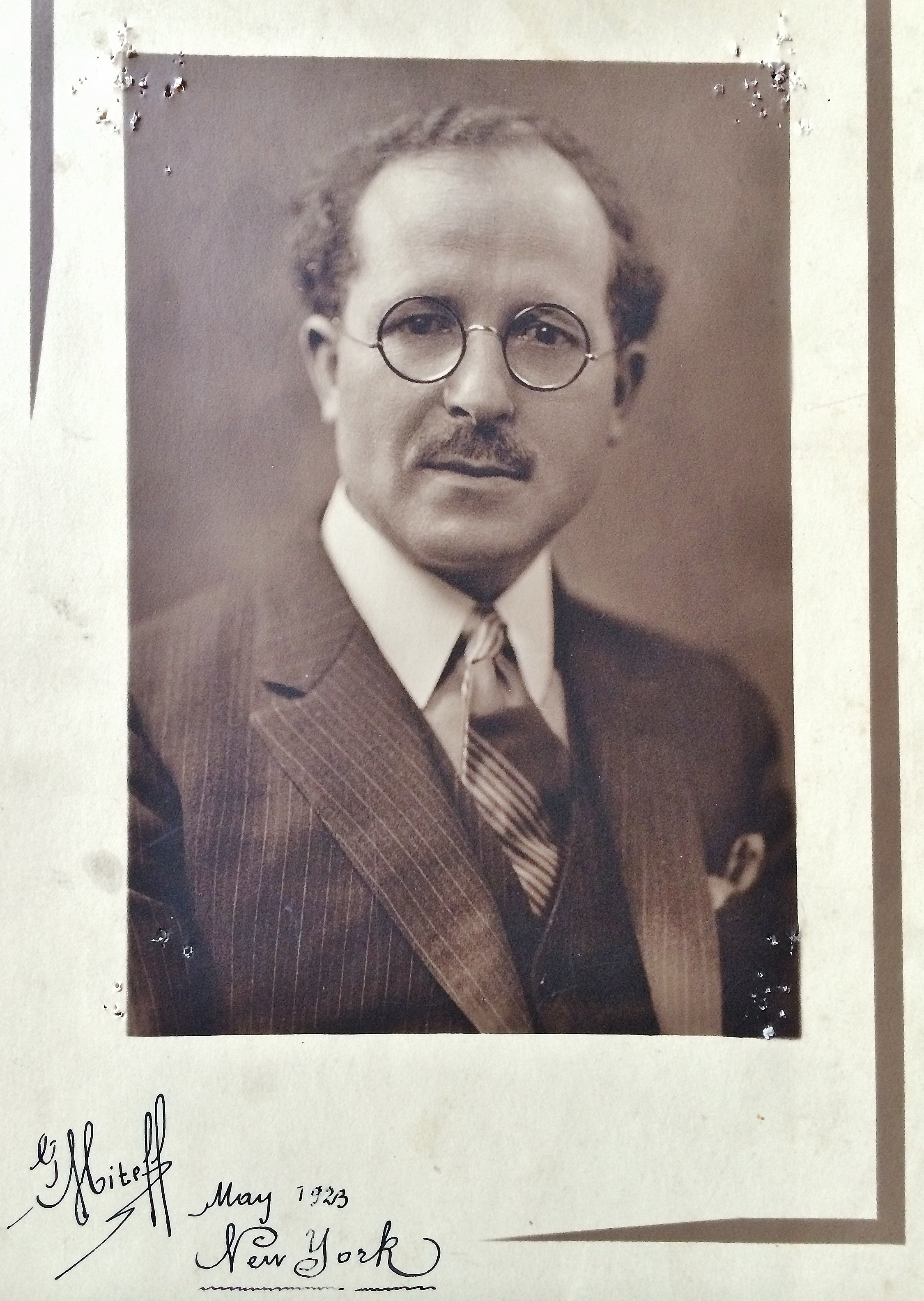 Български Художник